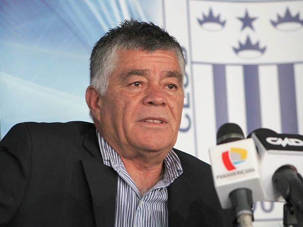 Miguel Ángel Arrué en conferencia de prensa en Matute el 12 de diciembre de 2011